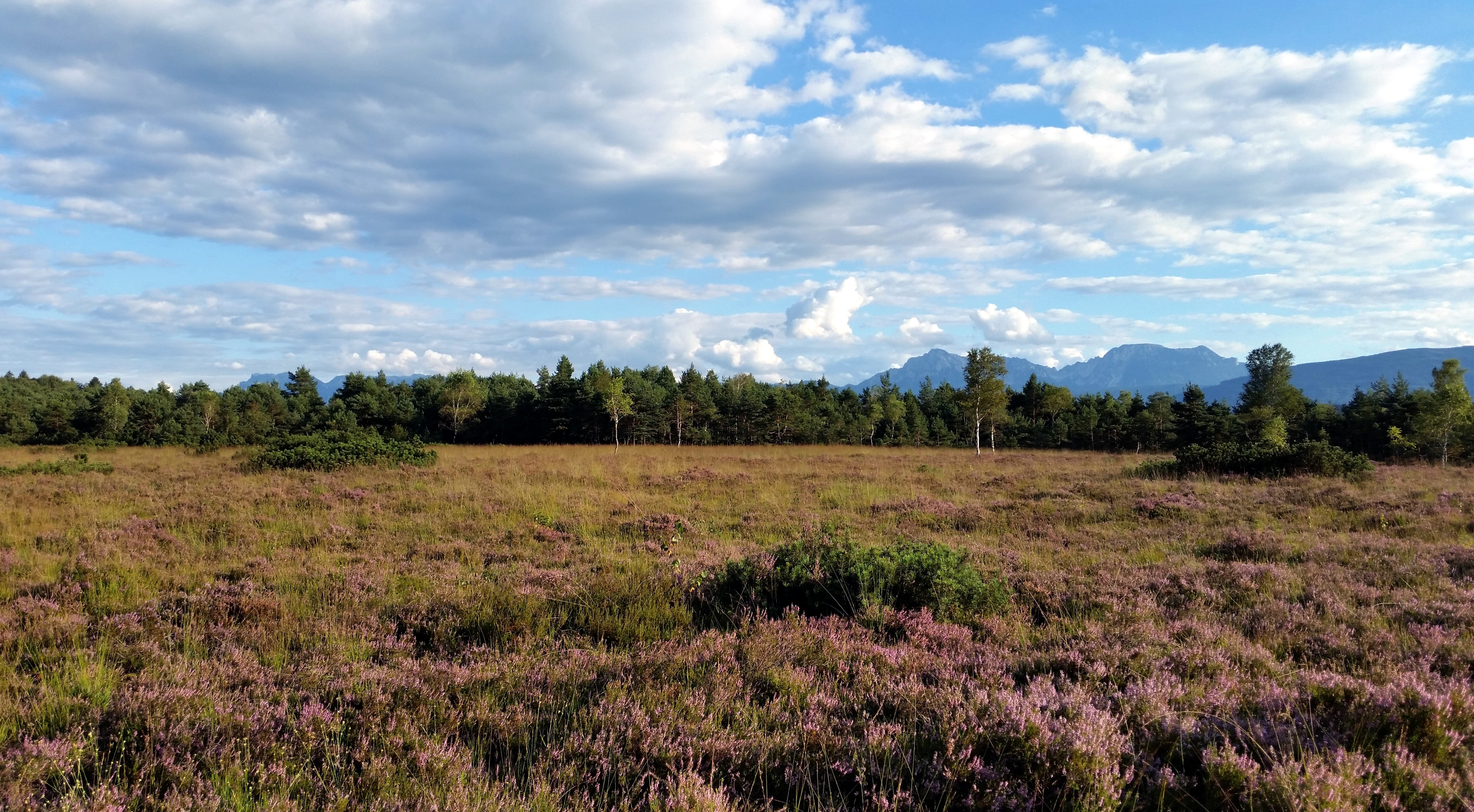 Hochmoor Schönramer Filz. Naturschutzgebiet „Schönramer Moor“ (NSG-00055.01)